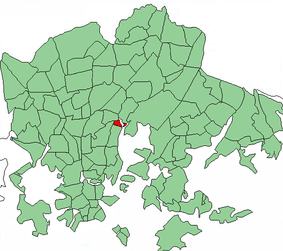 Map of Helsinki highlighting Vanhakaupunki